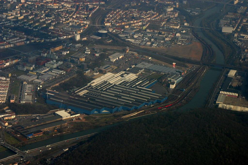 Fotoflug Saarland